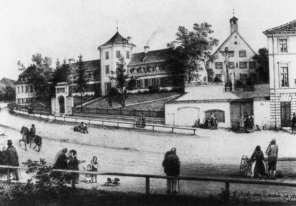 Das ehemalige Armenversorgungshaus am Gasteig, an dem jetzt das Kulturzentrum steht.